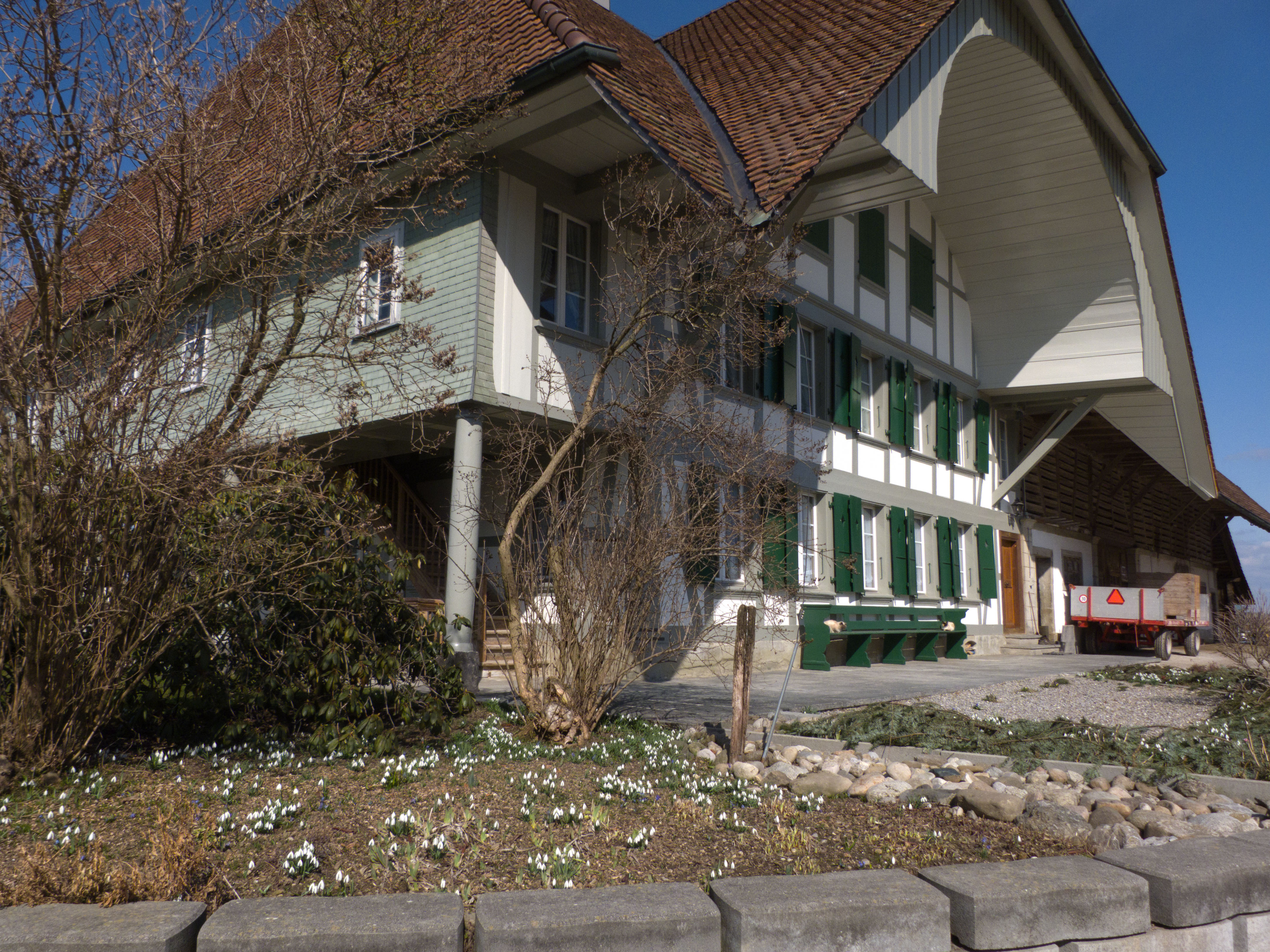 Bauernhaus Bühlikofen, Zollikofen